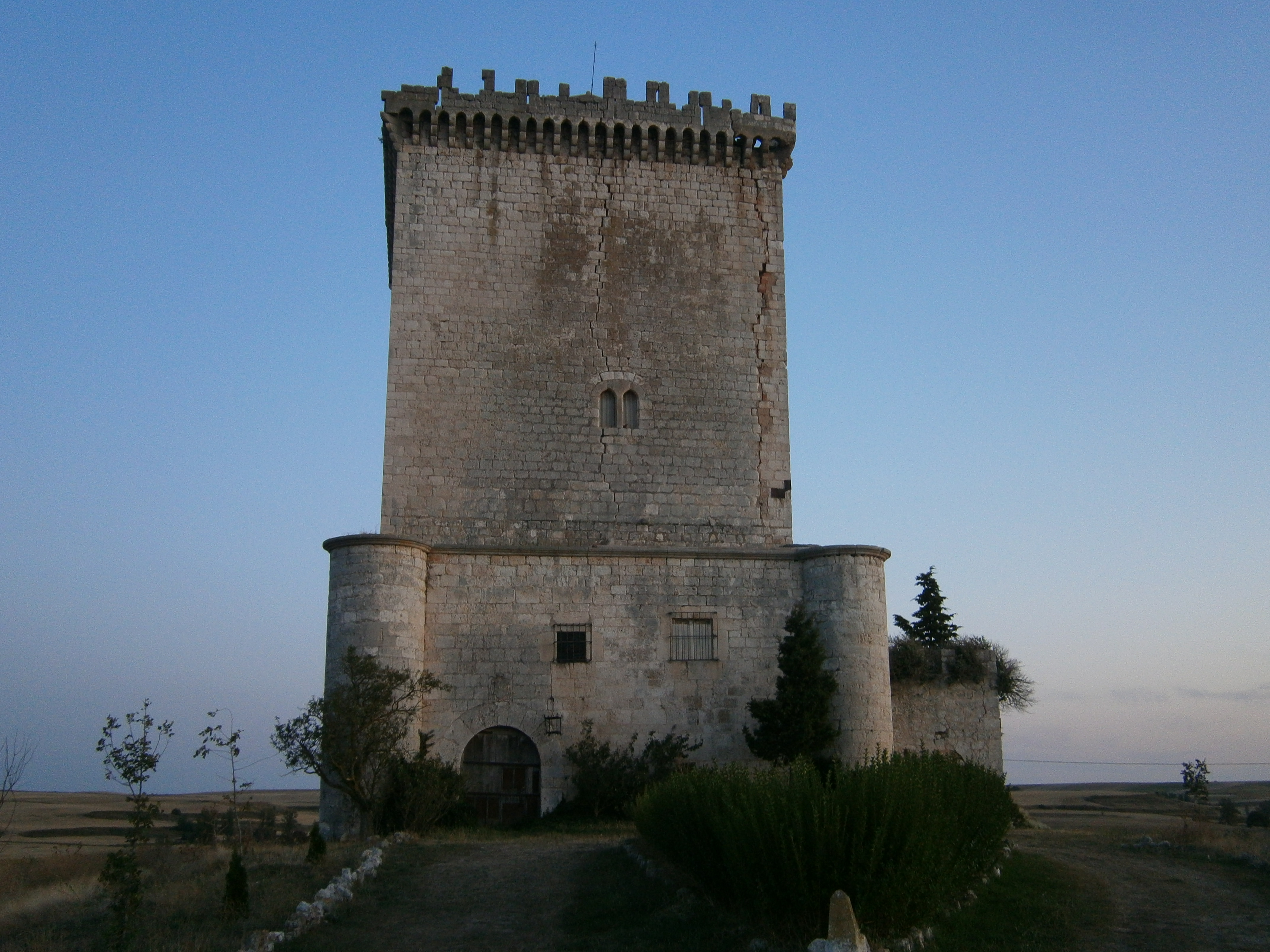 Castillo de Mazuelo de Muñó. Burgos (España)